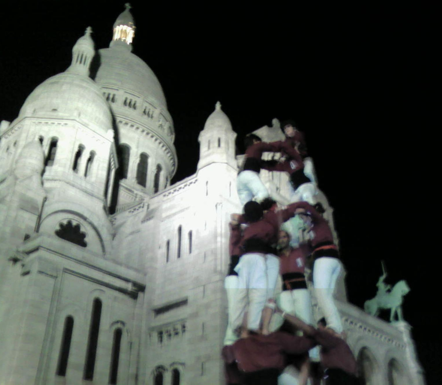 Els castellers d'Esparreguera muntant un castell devant de la basílica de Montmartre, a París (França).